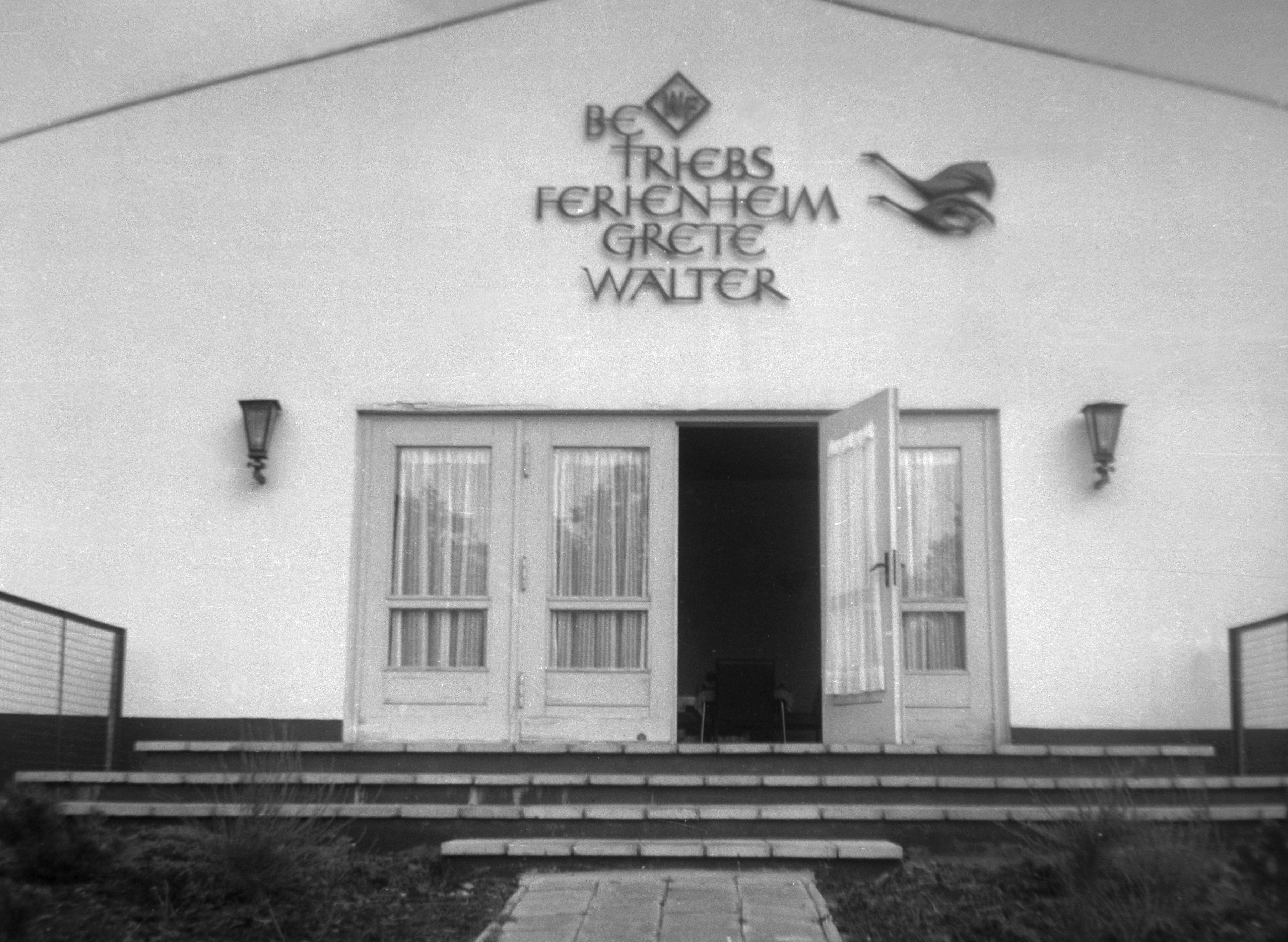 Eingang WF-Betriebsferienheim "Grete Walter" Dierhagen OT Neuhaus